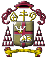 Herb abp. Życińskiego